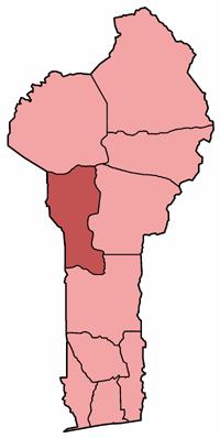 Mappa della diocesi di Djougou, nel Bénin. Lavoro personale, eseguito a partire da questa immagine di Commons. Fonte per i confini delle diocesi: Guida delle missioni cattoliche 2005, a cura della Congregatio pro gentium evangelizatione, Roma, Urbaniana University Press, 2005. Categoria:Chiesa cattolica in Benin